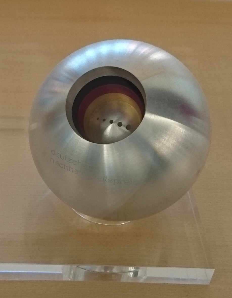 Deutscher Nachhaltigkeitspreis, Trophäe